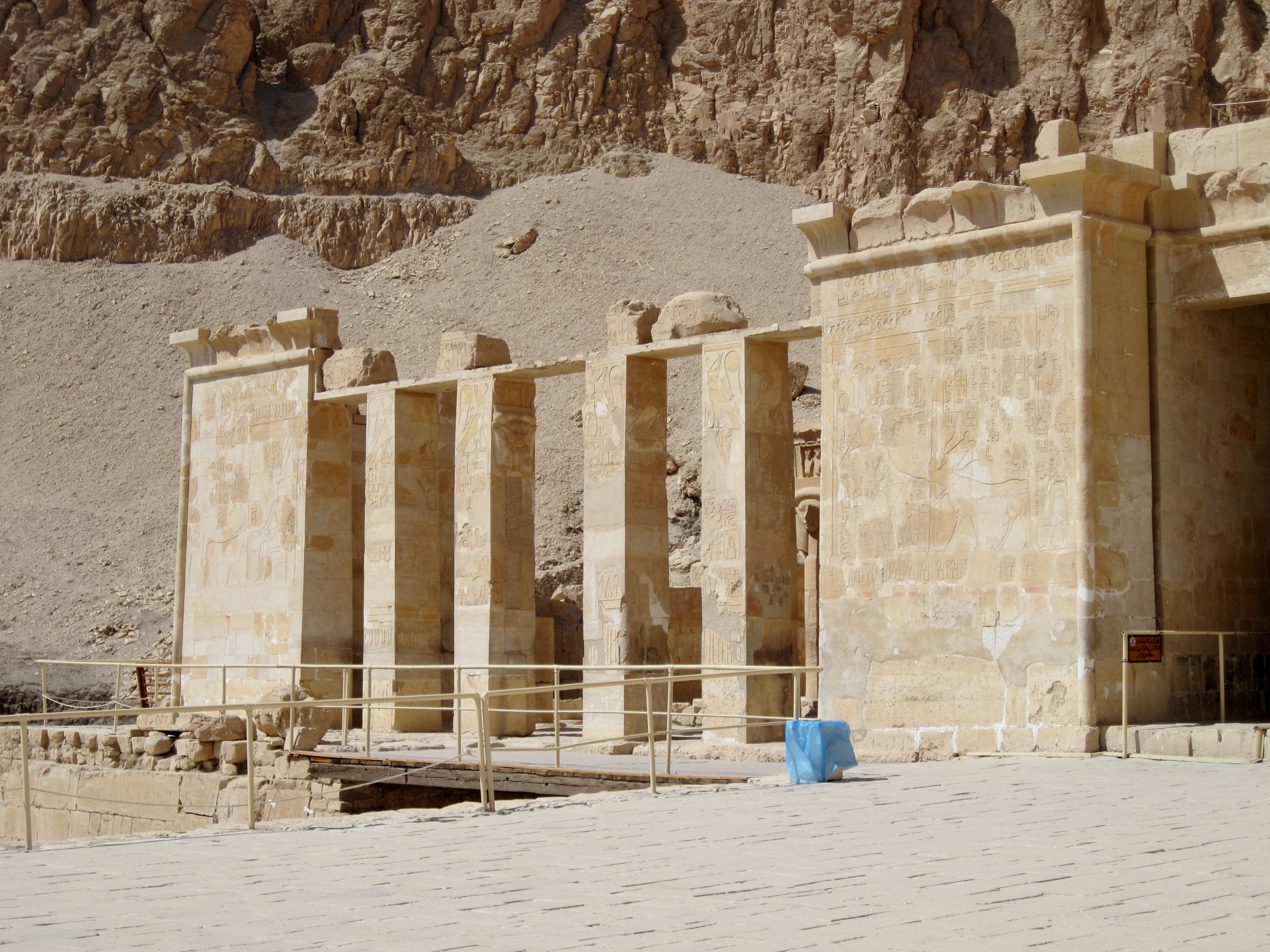 Fassade der Hathorkapelle im Totentempel der Hatschepsut in Deir el-Bahari nordwestlich von Luxor, Ägypten